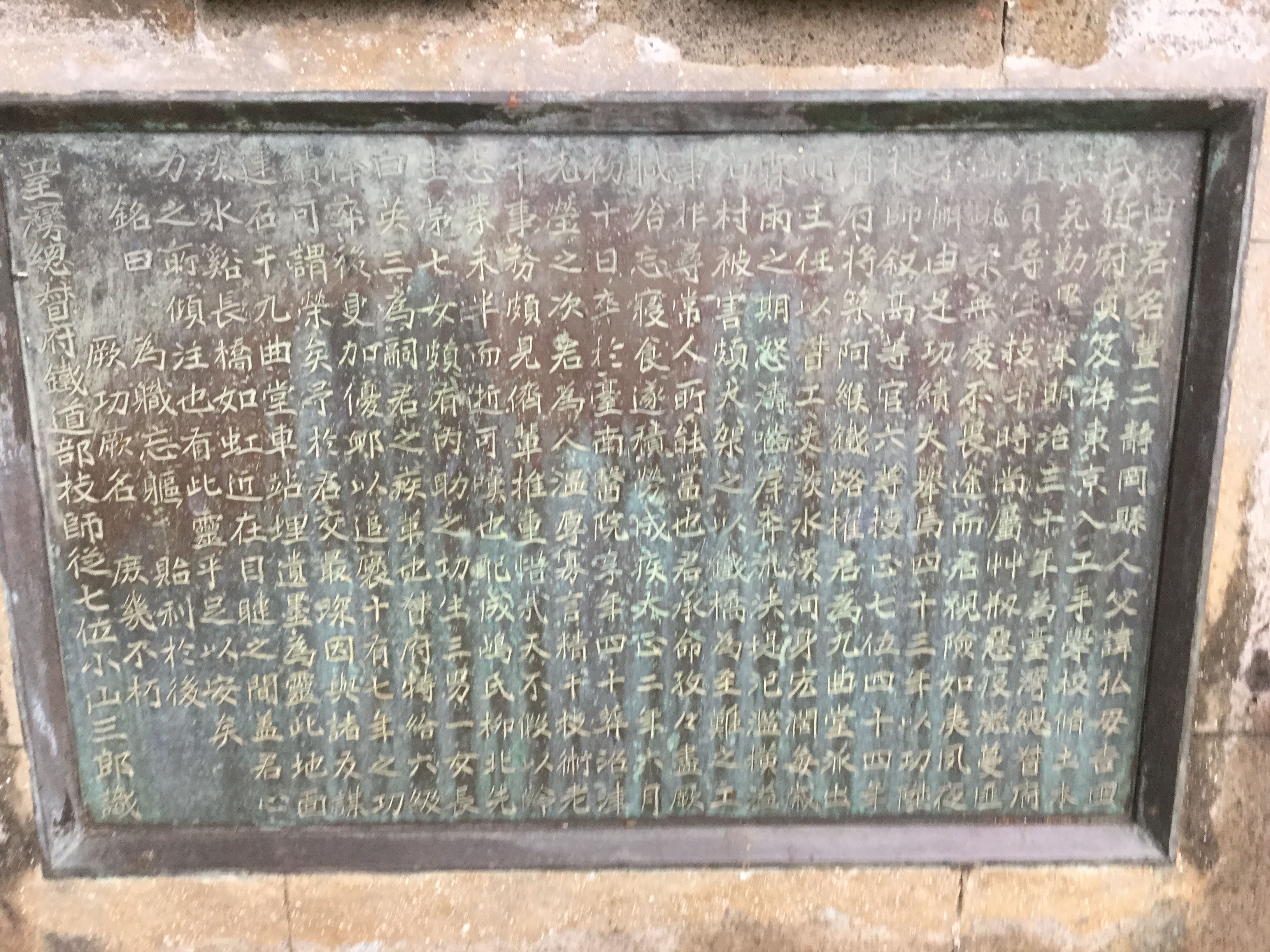 九曲堂車站傍的飯田豐二紀念碑的碑文